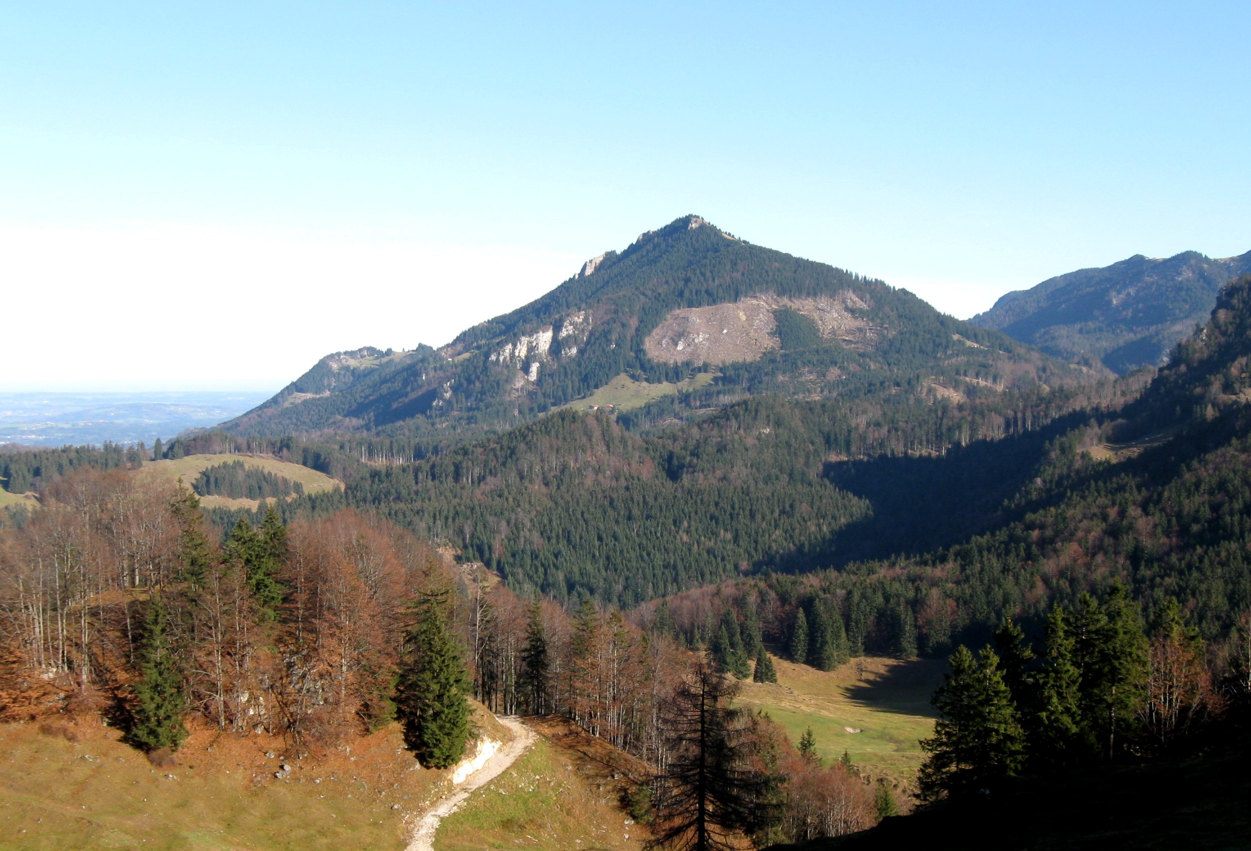 Feichteck (Chiemgauer Alpen) vom Kranzhorn aus gesehen